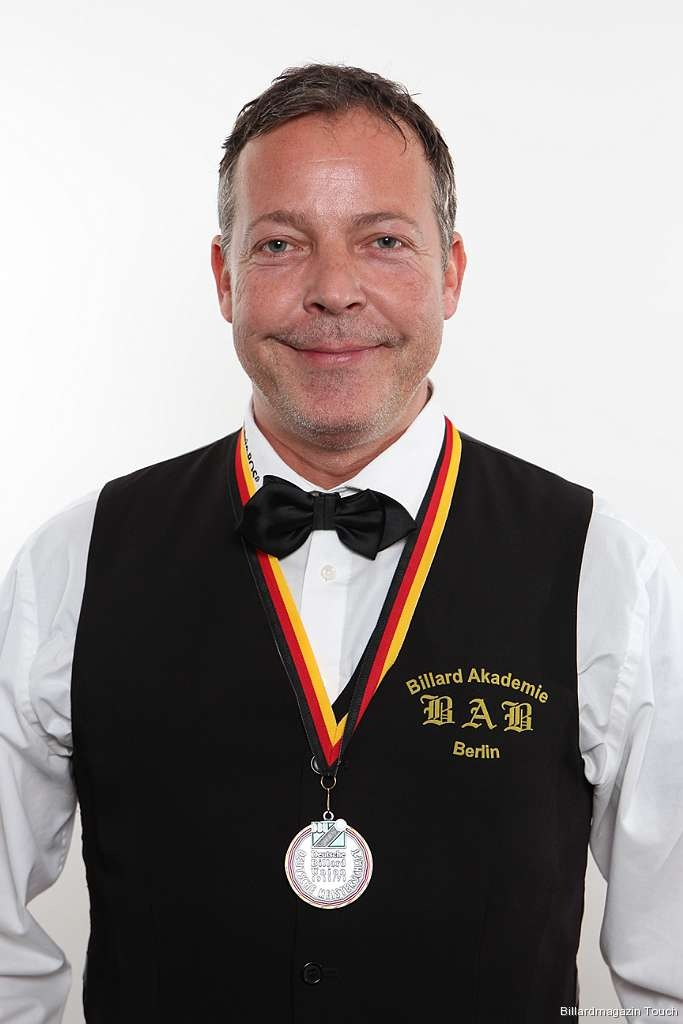 Johann Schirmbrandt, deutscher Dreibandspieler